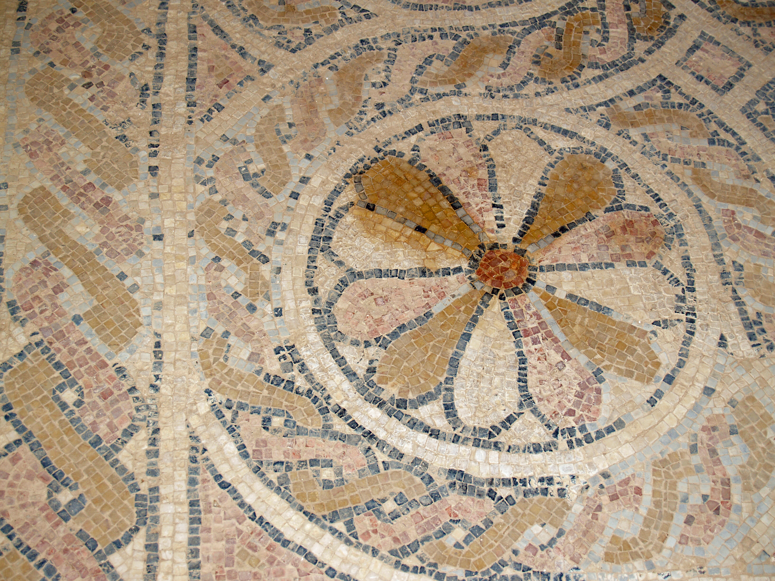 Masada Byzantine Church floor mosaic